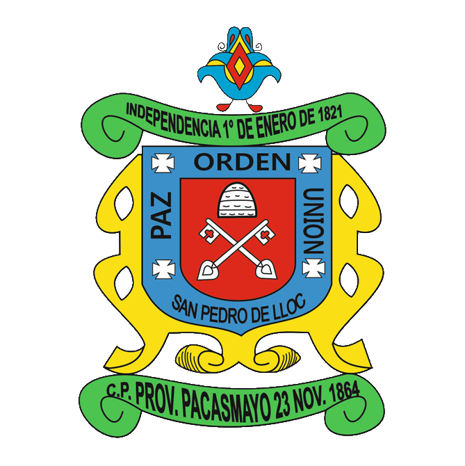 Escudo de la ciudad de San Pedro de Lloc - Pacasmayo